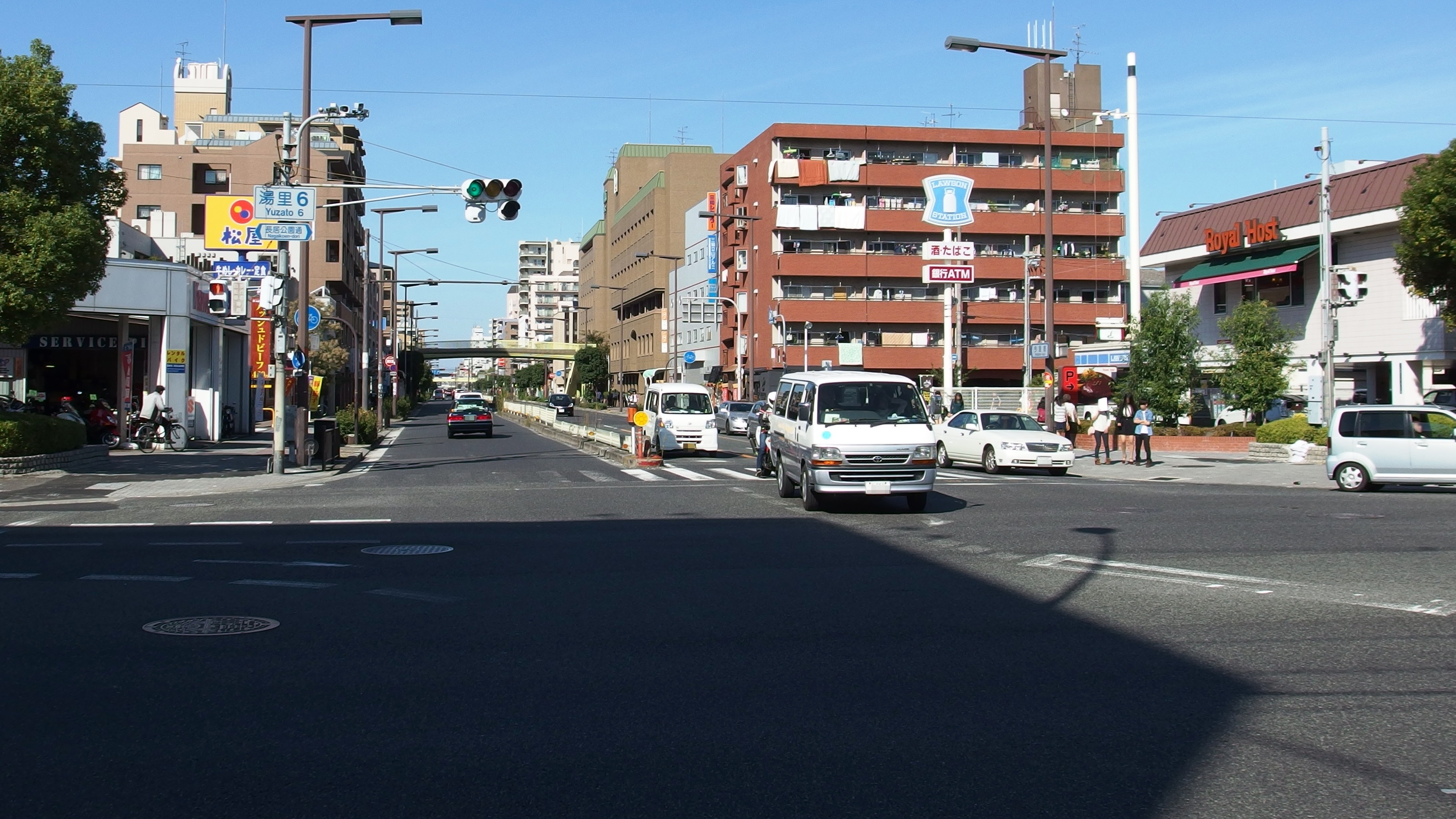 湯里6交差点, 今里筋, 大阪府大阪市